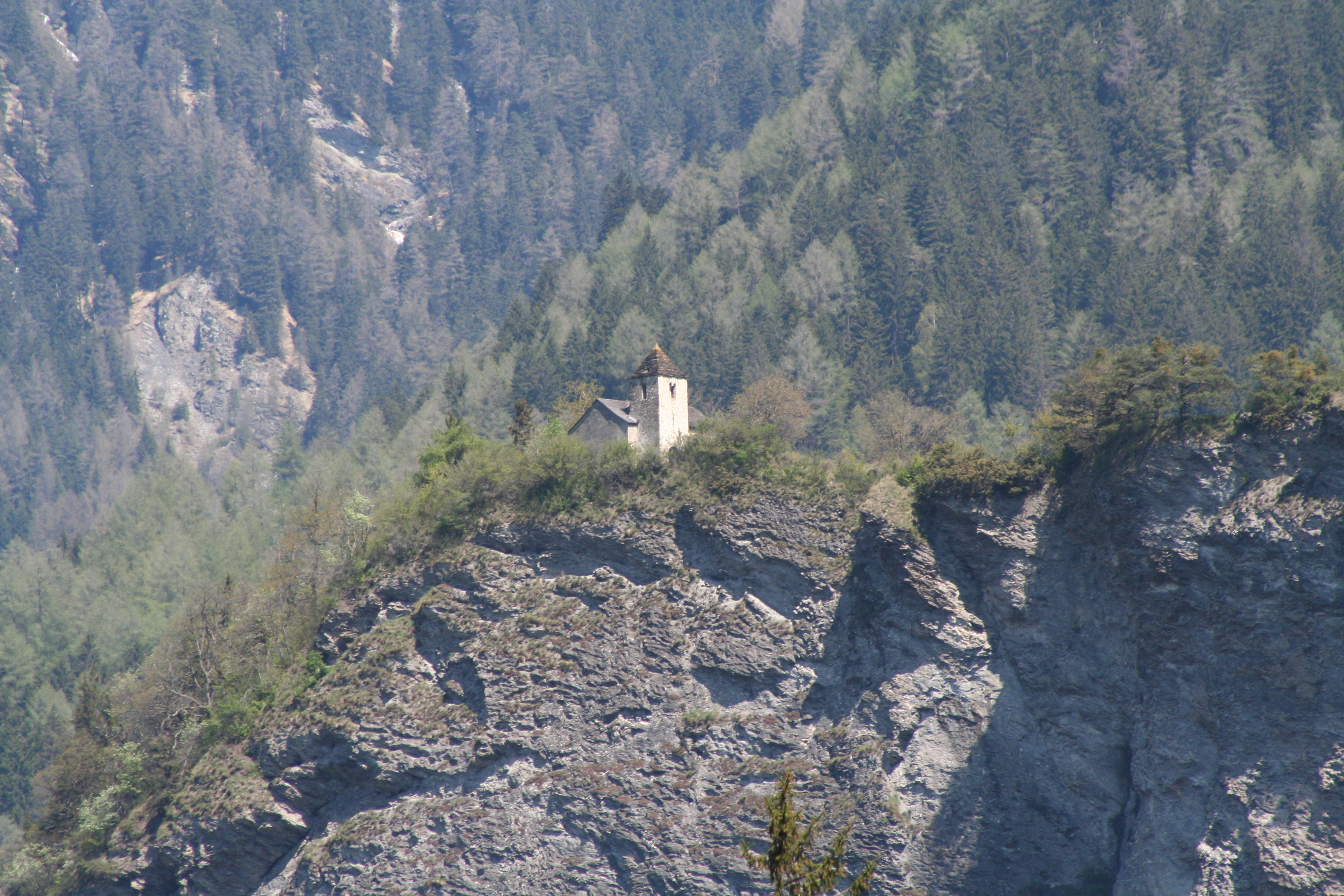 Kapelle St. Lorenz (Paspels) Ansicht von Westen